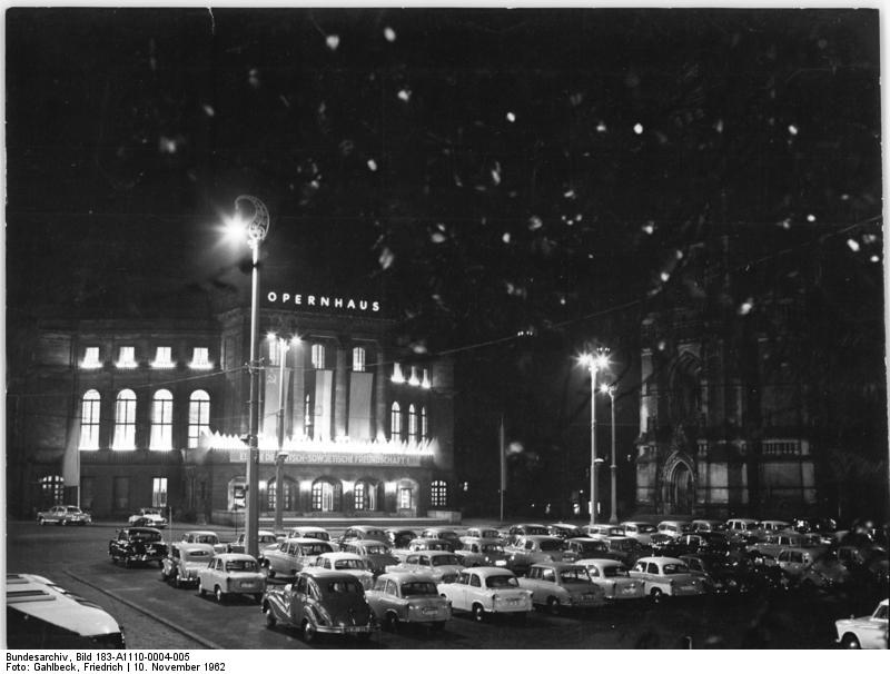 Chemnitz, Opernhaus, Nacht Zentralbild Gahlbeck Fckl-Qu 10.11.1962 Zur Theaterfestwoche der Freundschaft Karl-Marx-Stadt Ein kultureller Höhepunkt der Theatersaison der städtischen Theater Karl-Marx-Stadt ist die Festwoche der Freundschaft aus Anlaß des 45. Jahrestages der Großen Sozialistischen Oktoberevolution. Zu den vielbeachteten Aufführungen der Oper und des Schauspiels gehören die Oper " Senion Kotko " und die " Irkutsker Geschichte ". Außerdem bringt das Schauspielhaus die dramatische Erzählung "Ozean" des sowjetischen Schriftstellers Alexander Stein als deutsche Erstaufführung. UBz: Das festlich beleuchtete Opernhaus von Karl-Marx-Stadt.